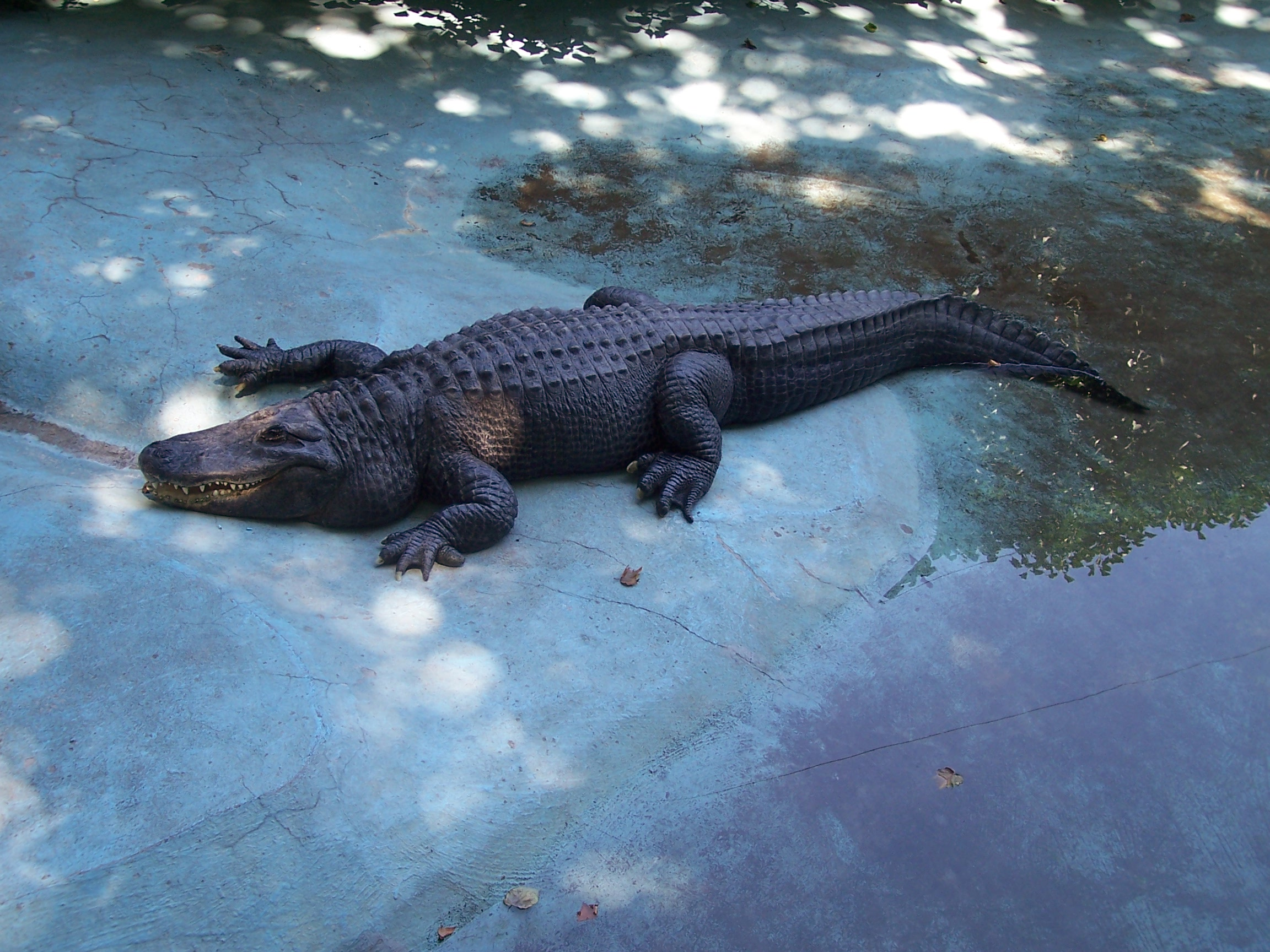 Аллигатор Муя (Муја) - Белградский зоопарк